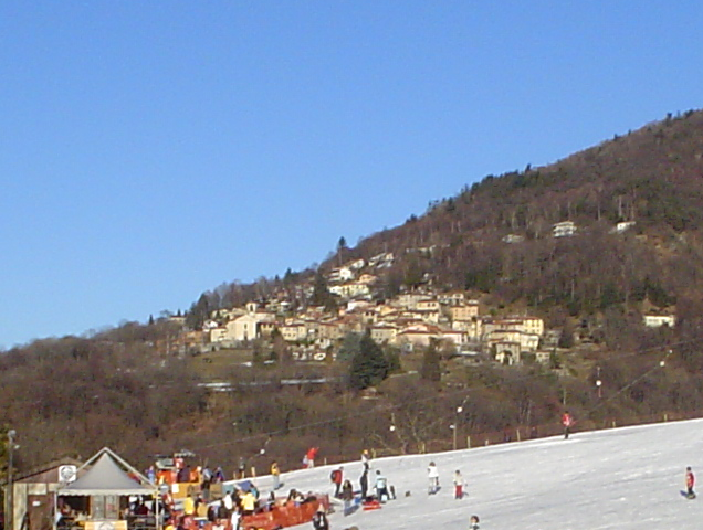 Foto scattata da paco (scrivimi) 21:46, 25 gen 2006 (CET) Aranno (Svizzera) visto dal campo di sci di Novaggio (Bedea)